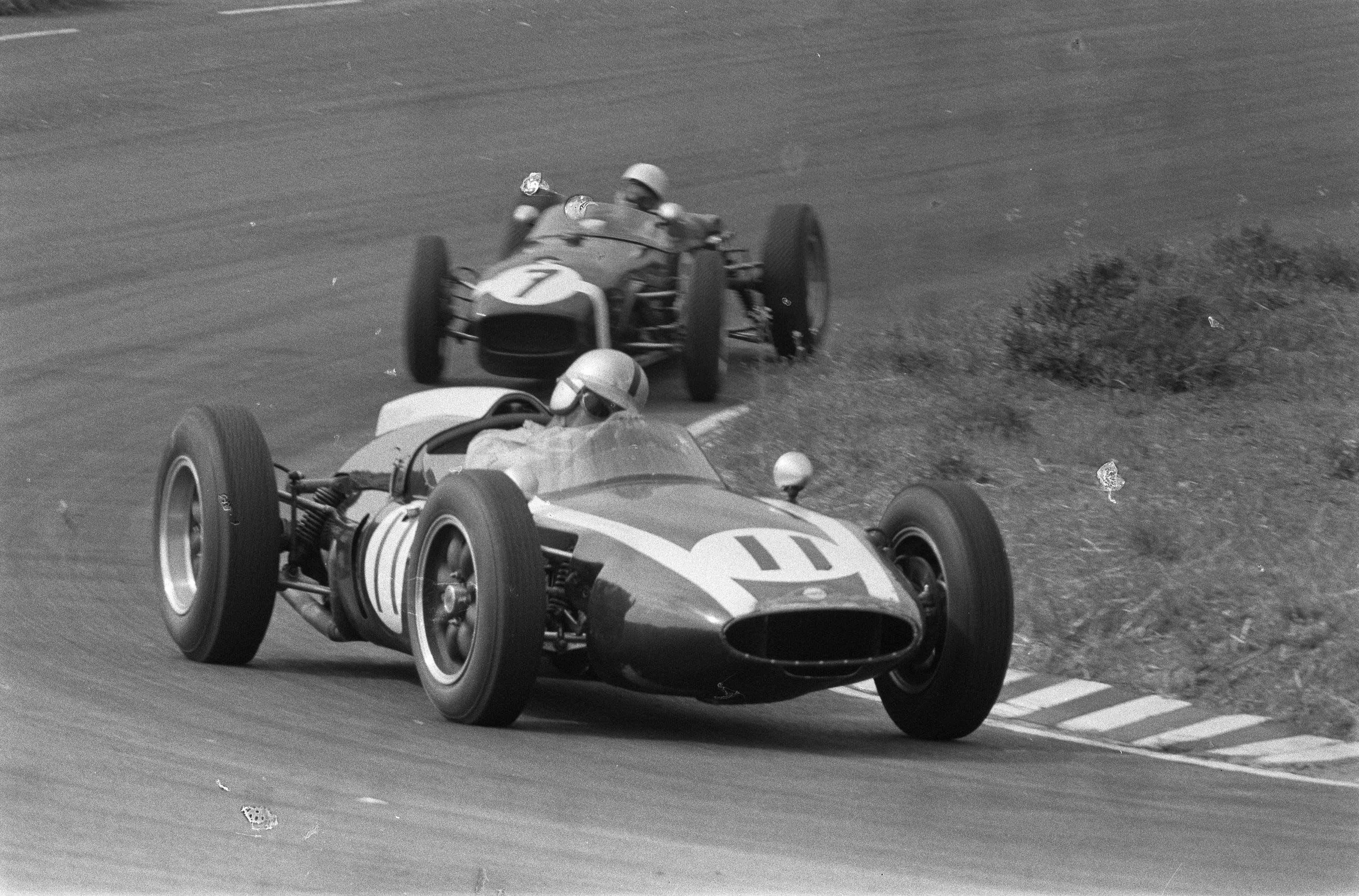 Collectie / Archief : Fotocollectie Anefo Reportage / Serie : Autoraces op het circuit van Zandvoort. Jack Brabham uit Australie onderaan de Hunzerug in een Cooper. Beschrijving : Autoraces op het circuit van Zandvoort. Jack Brabham uit Australie onderaan de Hunzerug in een Cooper. Datum : 6 juni 1960 Locatie : Noord-Holland, Zandvoort Trefwoorden : auto's, sport Persoonsnaam : Brabham Jack, Cooper Fotograaf : Fotograaf Onbekend / Anefo Auteursrechthebbende : Nationaal Archief Materiaalsoort : Negatief (zwart/wit) Nummer archiefinventaris : bekijk toegang 2.24.01.05 Bestanddeelnummer : 911-3161